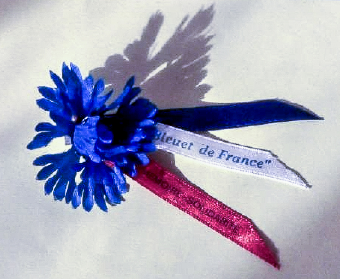 Bleuet_de_France_circa_1950